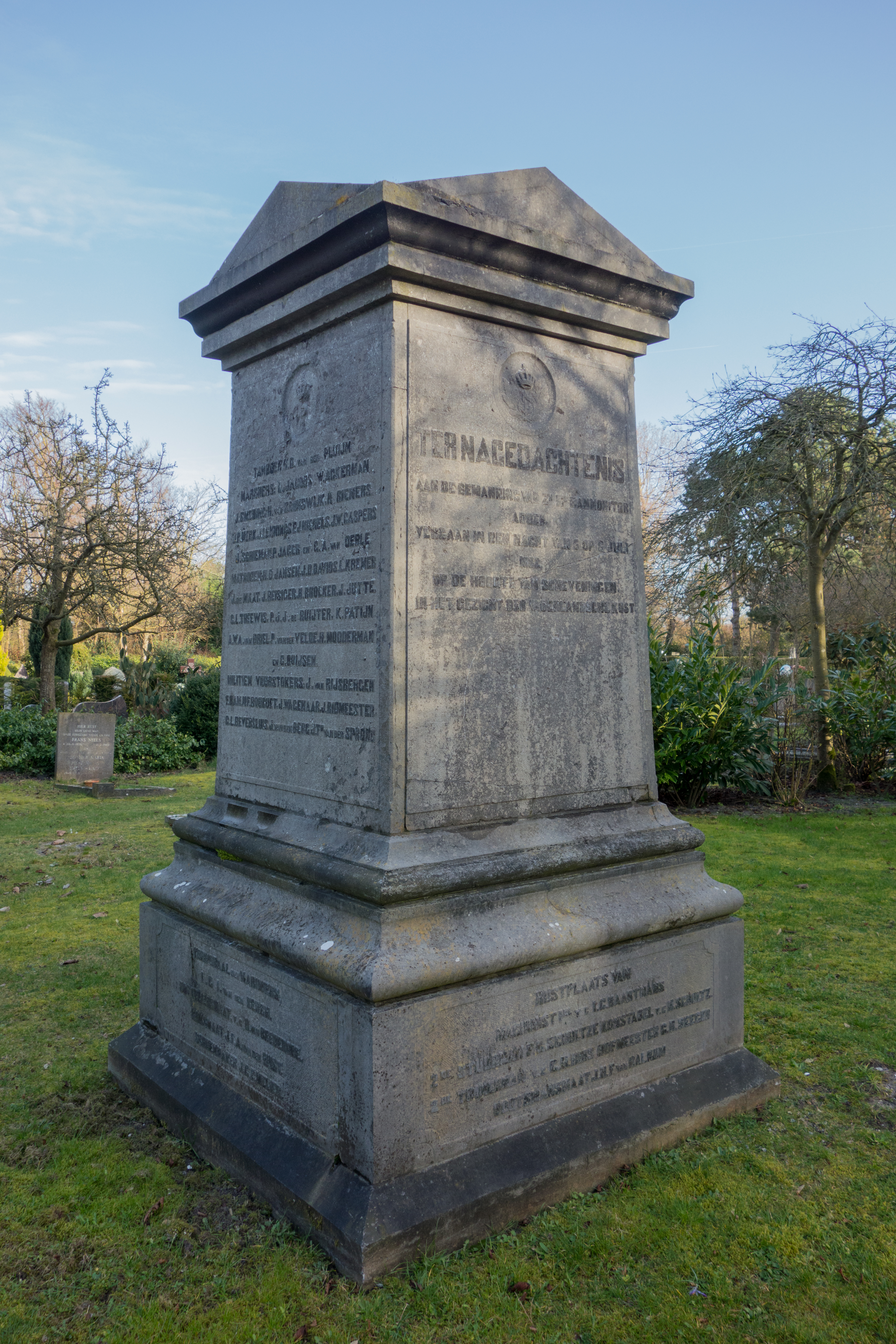 Gedenksteen voor de in 1882 gezonken rammonitor Zr.Ms. Adder.